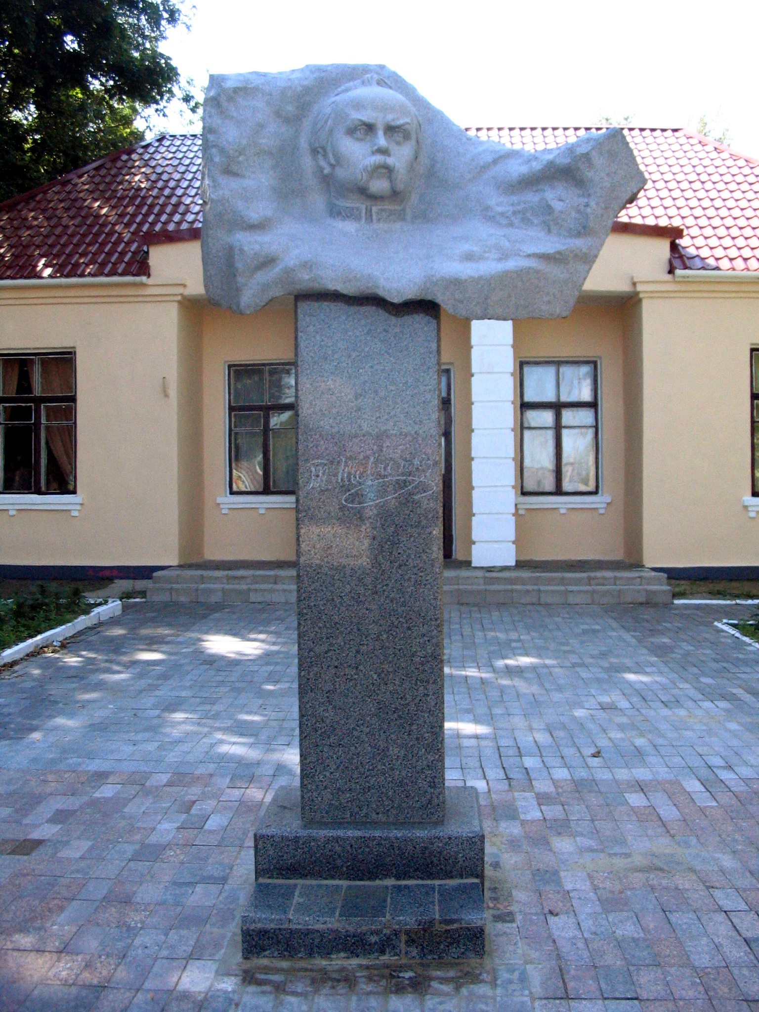 Пам'ятник Т.Г. Шевченку в с. Ємільчине